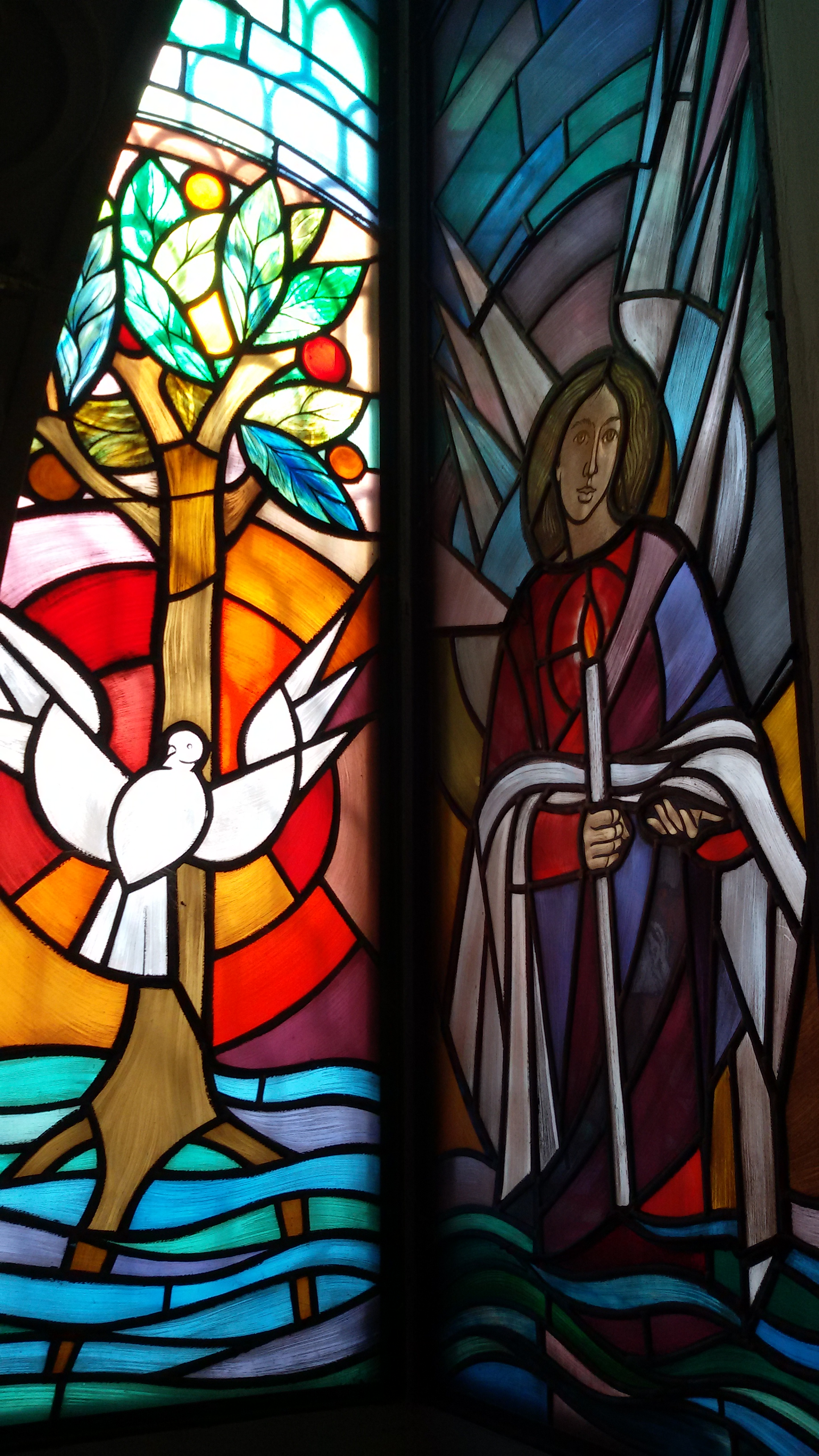 Chiesa di Santa Cristina Quinto di Treviso